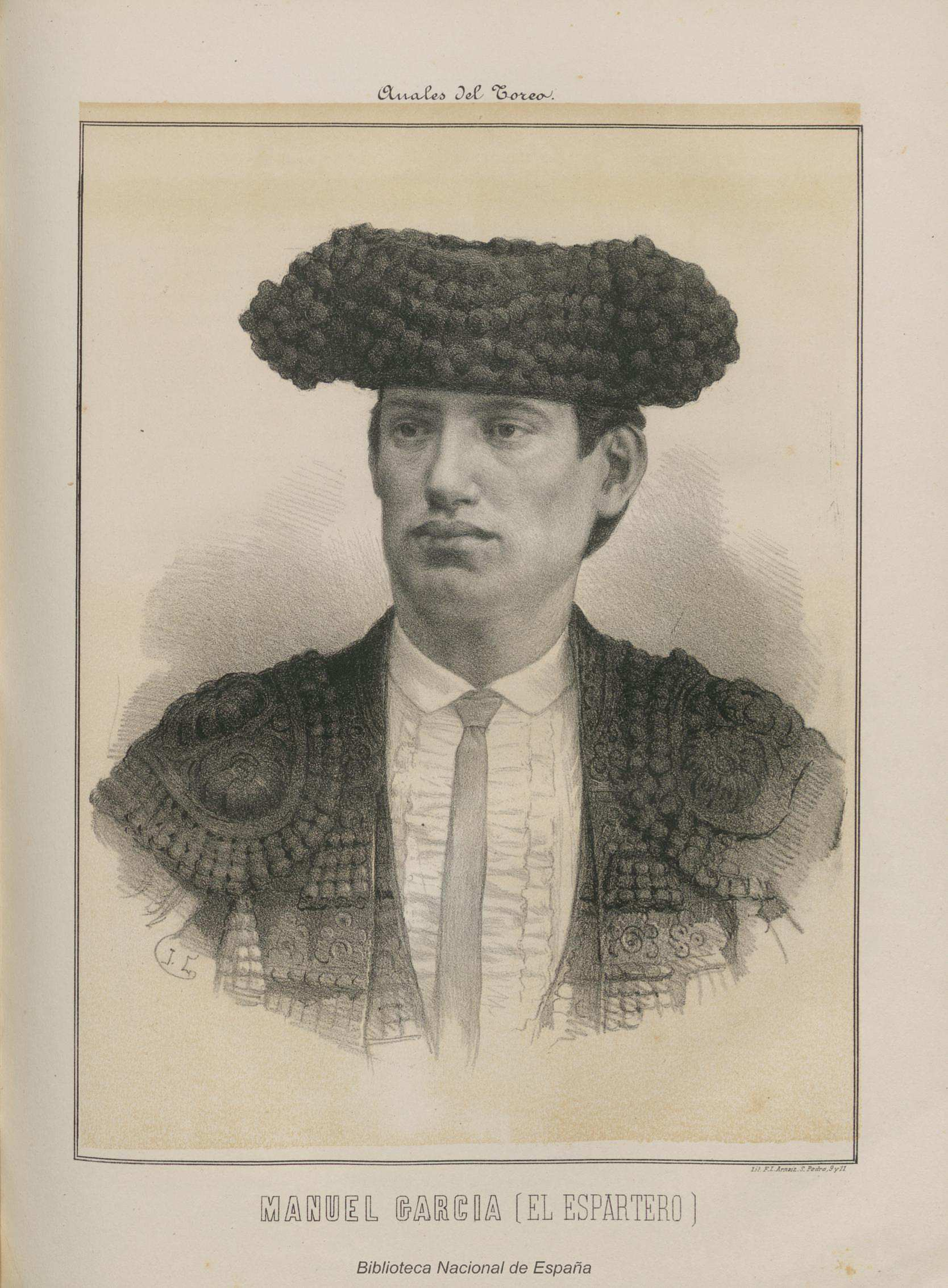 Manuel García, el Espartero, litografía de J. Cuevas, ilustración de Anales del toreo : reseña histórica de la lidia de reses bravas : galería biográfica de los principales lidiadores: razón de las primeras ganaderías españolas, sus condiciones y divisas obra escrita por José Velázquez y Sánchez; e ilustrada por reputados artistas, Madrid, 1888.